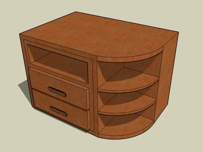 一个床头柜，使用Google SketchUp 6创建